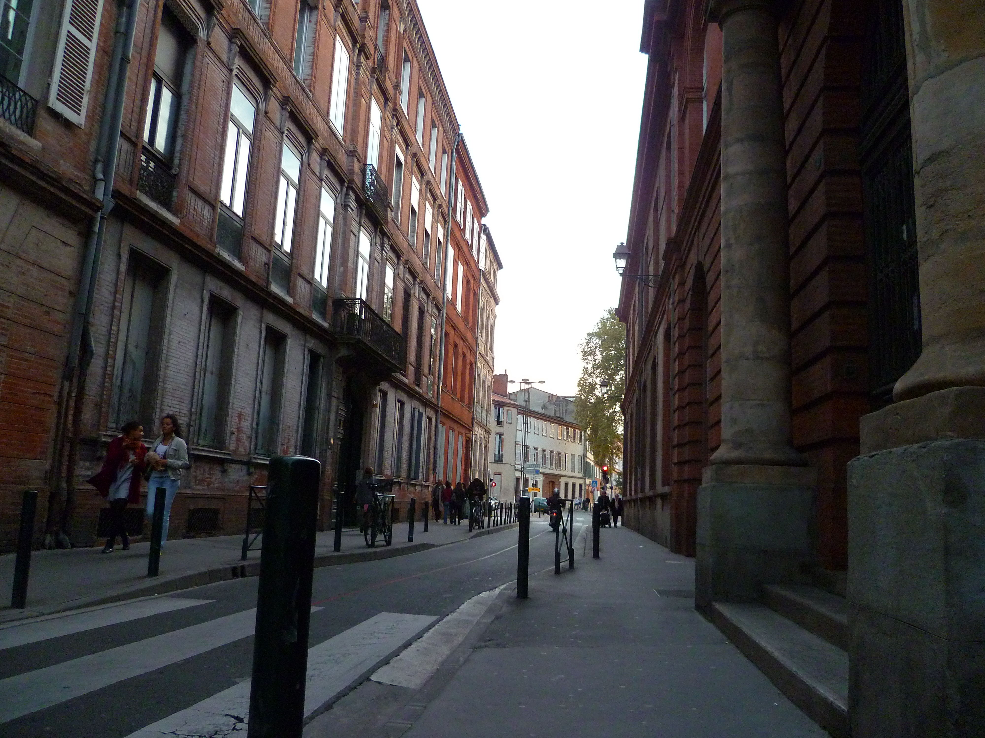 La rue Albert Lautmann à Toulouse.